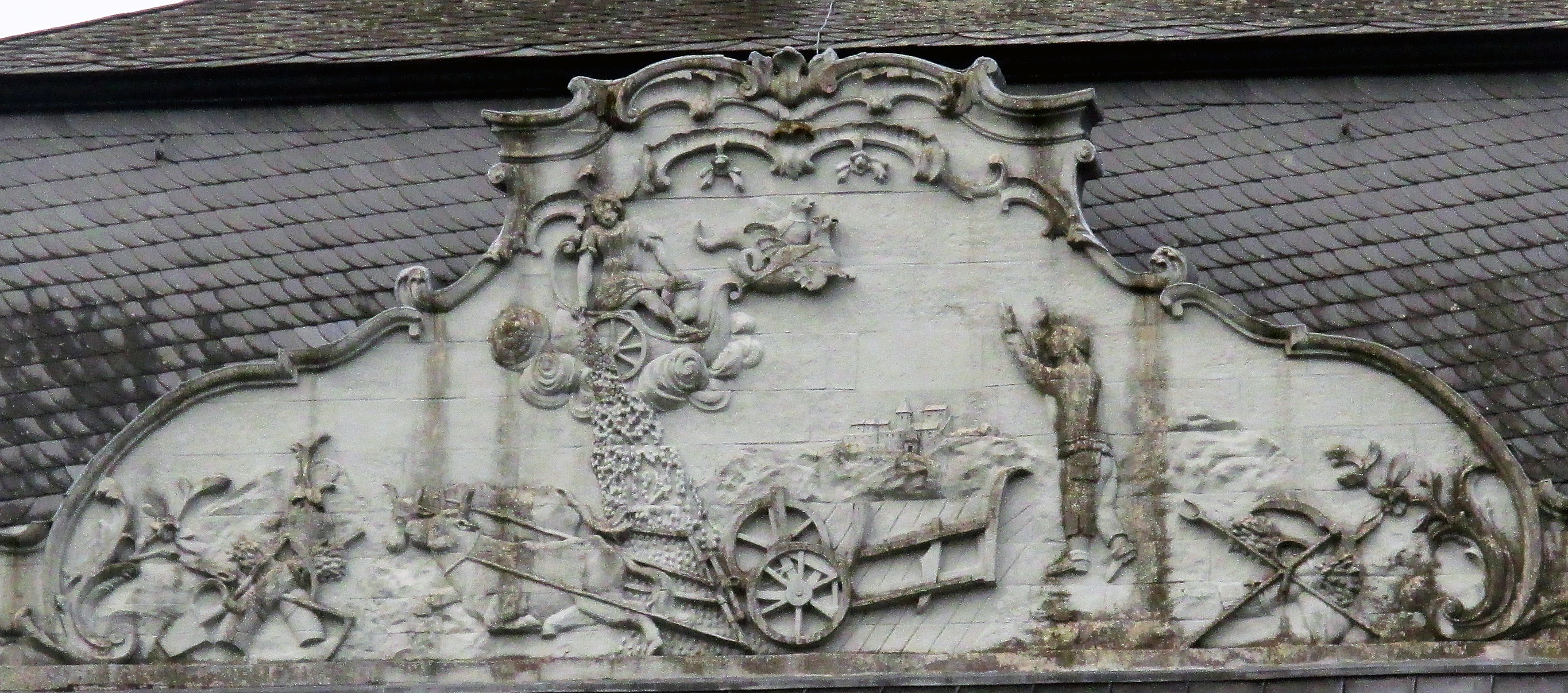 Relief an der östlichen Vorburg Schloss Wickrath